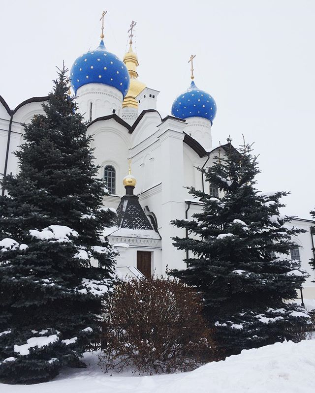 Собор Благовещенский кафедральный: Кремль, Казань, Татарстан